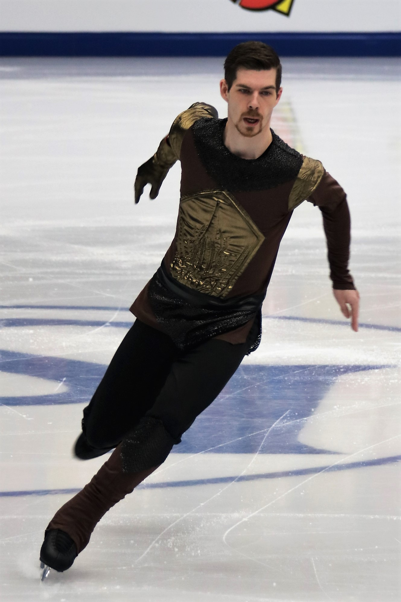 Пауль Фентц (Германия) на Чемпионате Европы по фигурному катанию 2018.